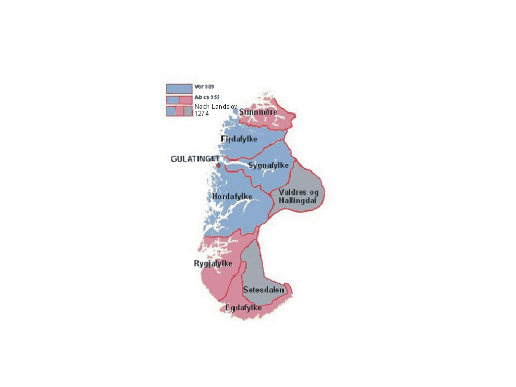 Zuständigkeitsbereich des Gulathings. Author: Christian Bickel